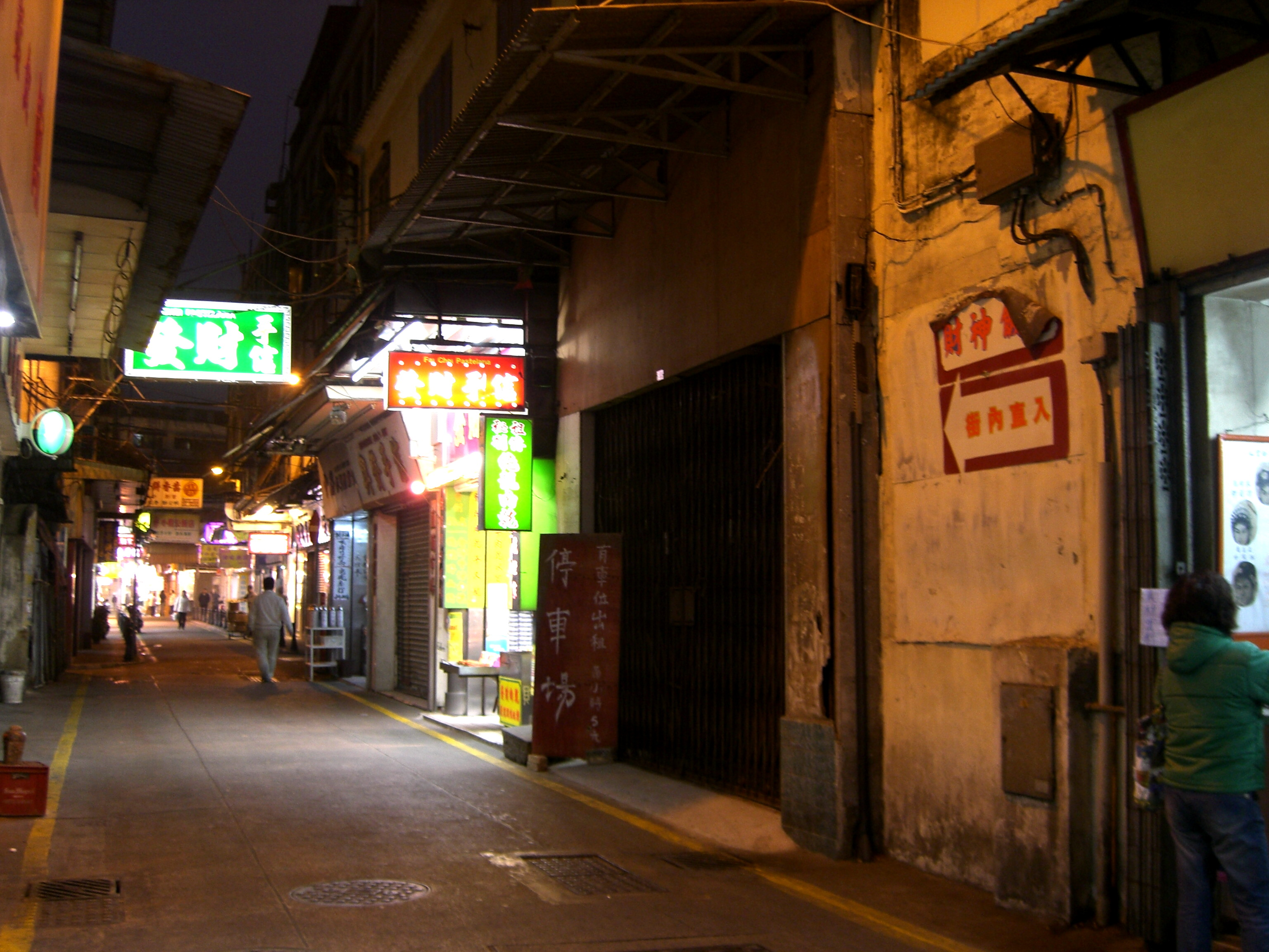 Travessa do Auto Novo in Macau